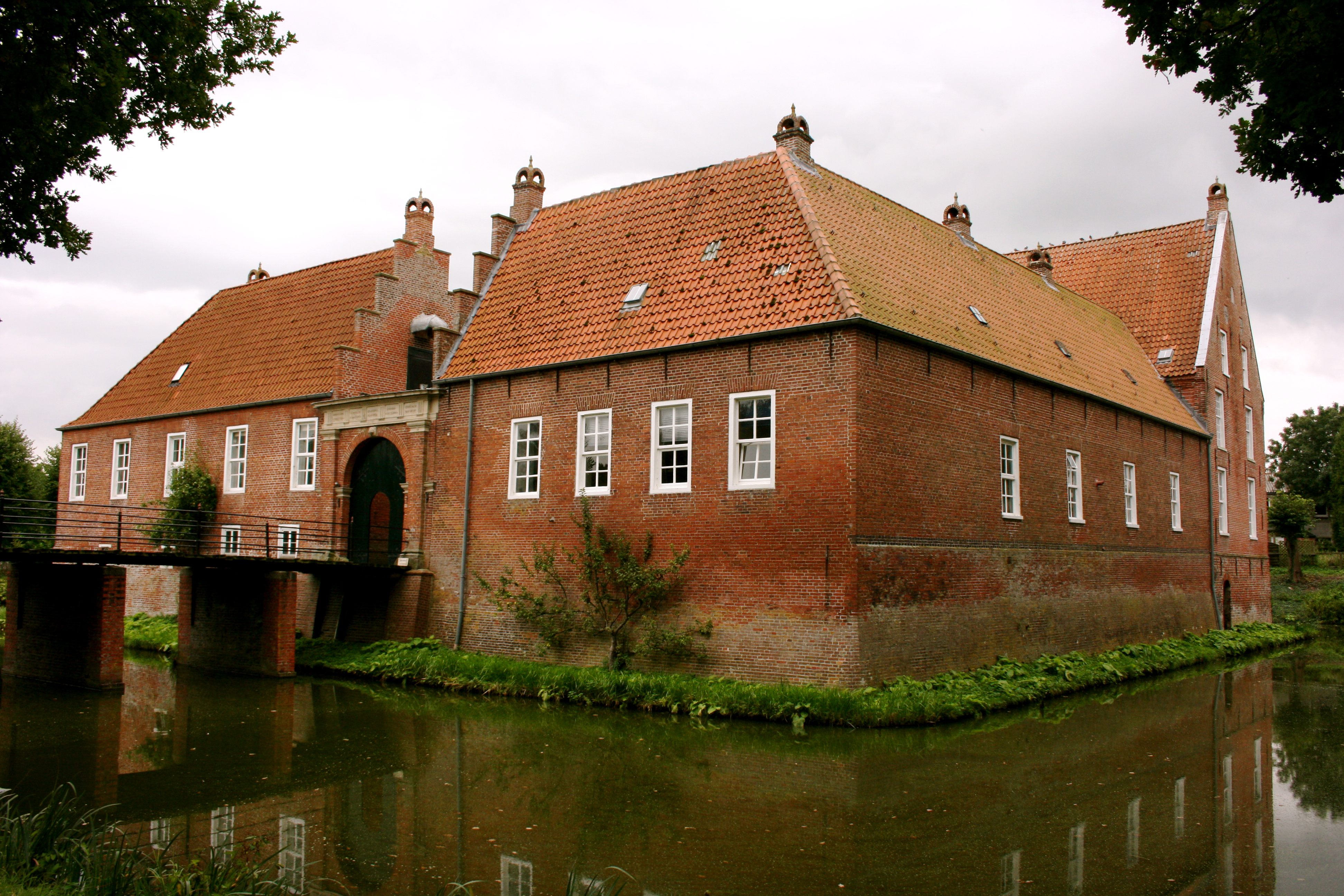 Burg Hinta in Hinte bei Emden (Ostfriesland)